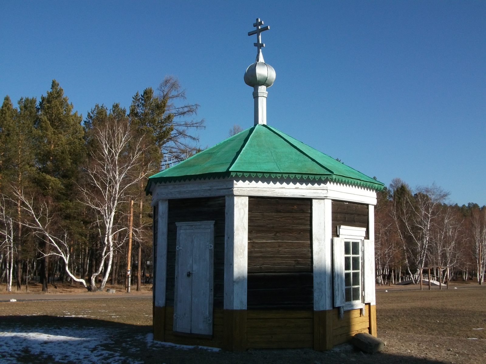 Часовня из с. Староселенгинска (Республика Бурятия, Улан-Удэ, посёлок Верхняя Березовка, из село Староселенгинска Селенгинского района, Этнографический музей народного деревянного зодчества)